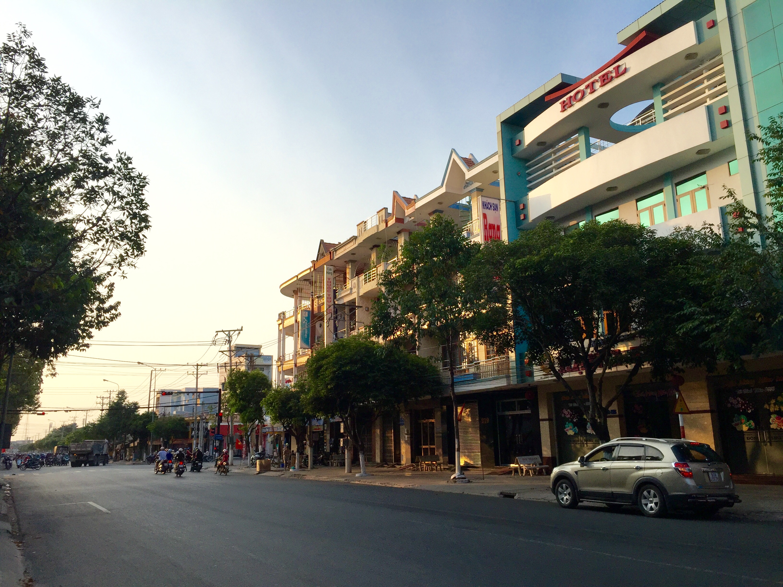 Duong Hung vuong, phuong 3. Tp Tanan, Longan